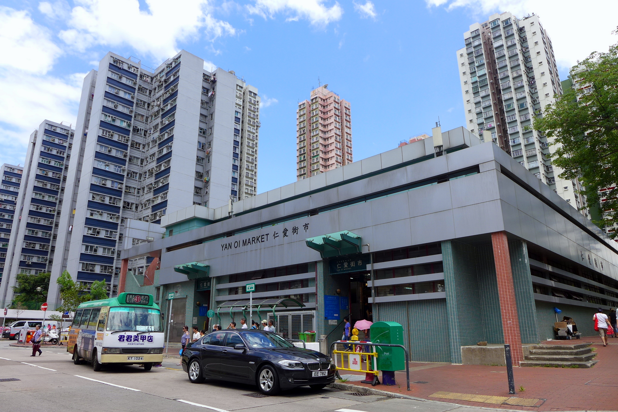 Yan Oi Market